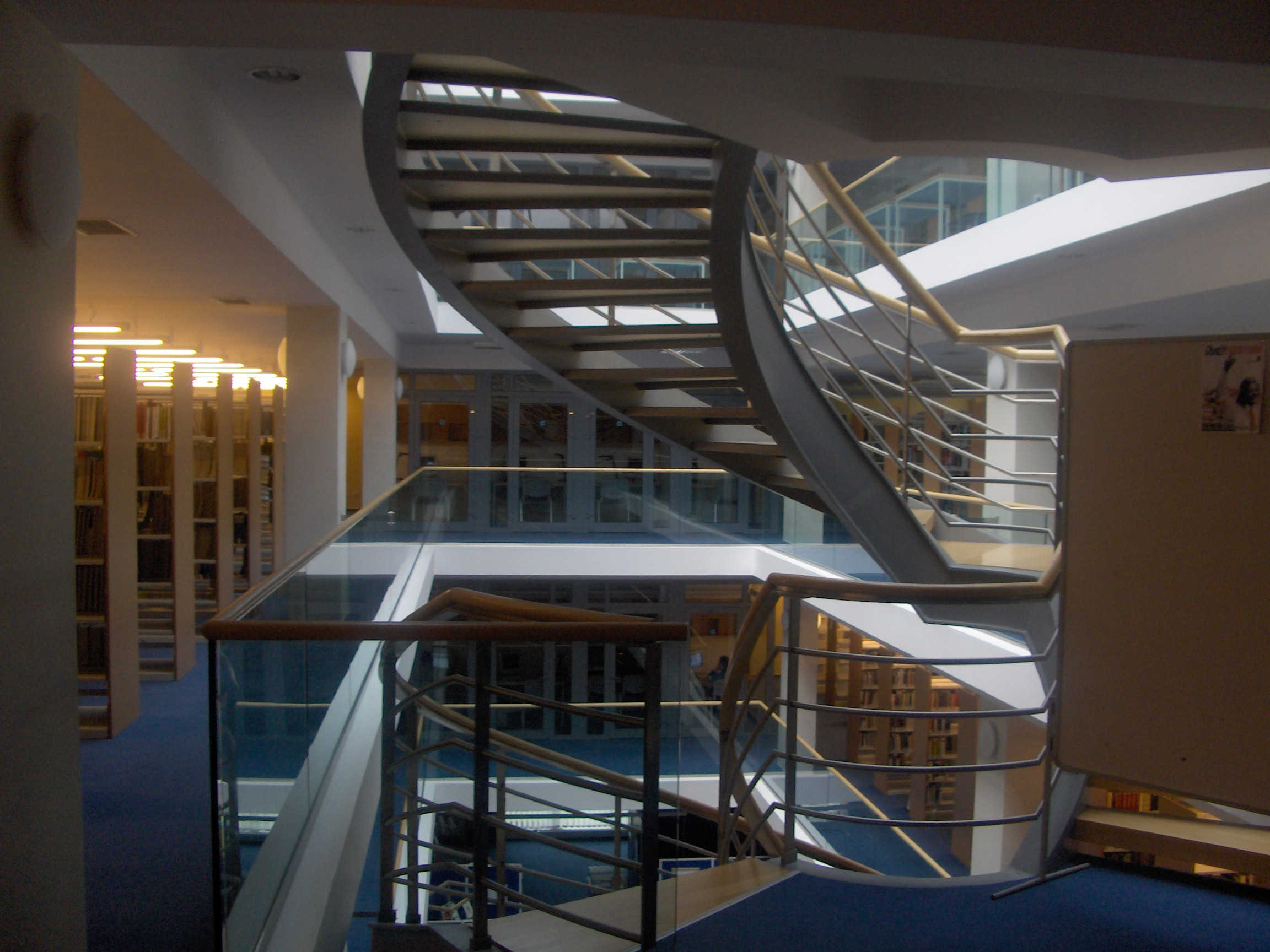 Biblioteka CP w Słubicach.